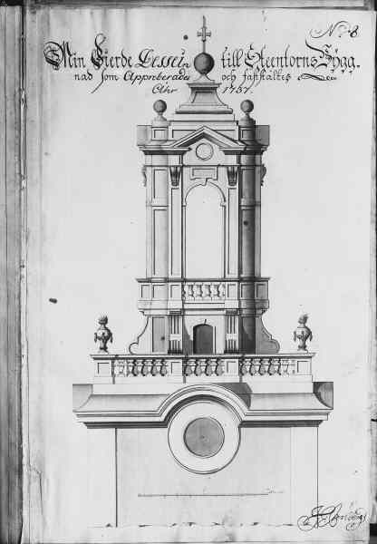 Förslag till ombyggnad av västtornet, foto efter ritning av J. E. Carlberg. Kategori: (01) Exteriörer, detaljerFörslag till ombyggnad av västtornet, foto efter ritning av J. E. Carlberg.